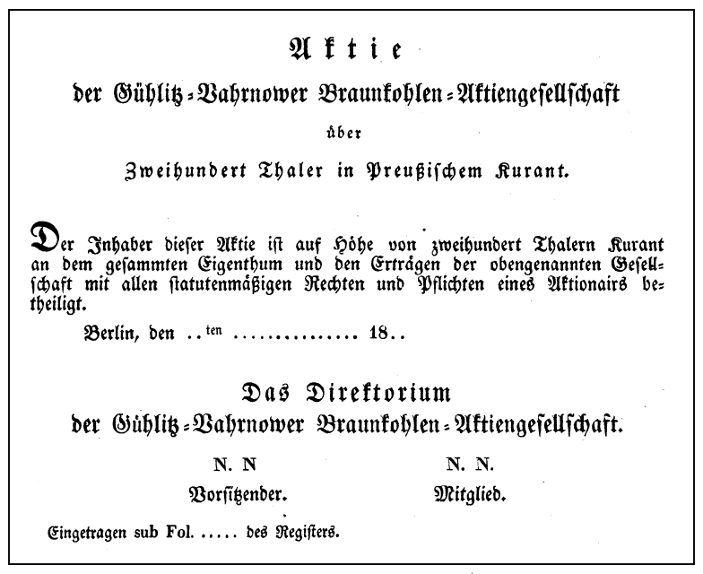 Gühlitzer Aktie